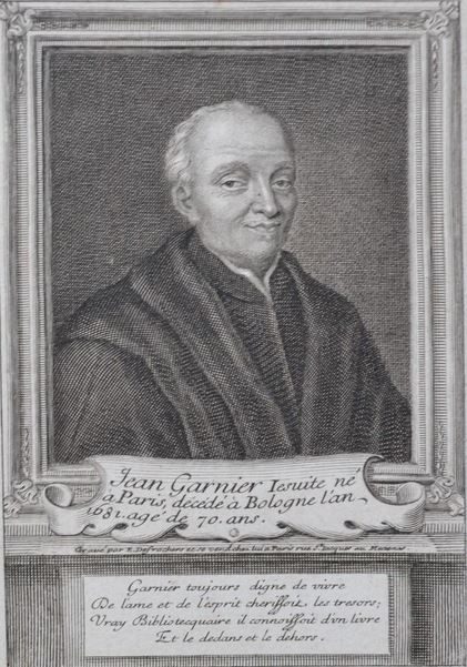 gravure XVIIe